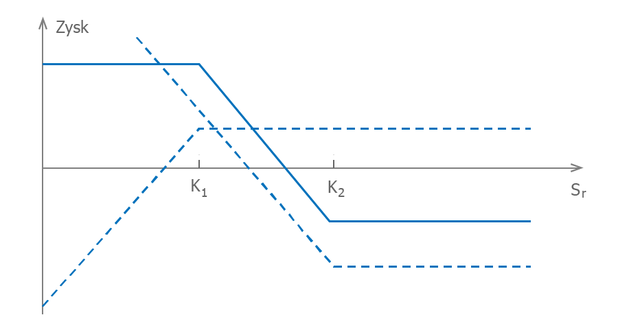 Strategia opcyjna bear spread